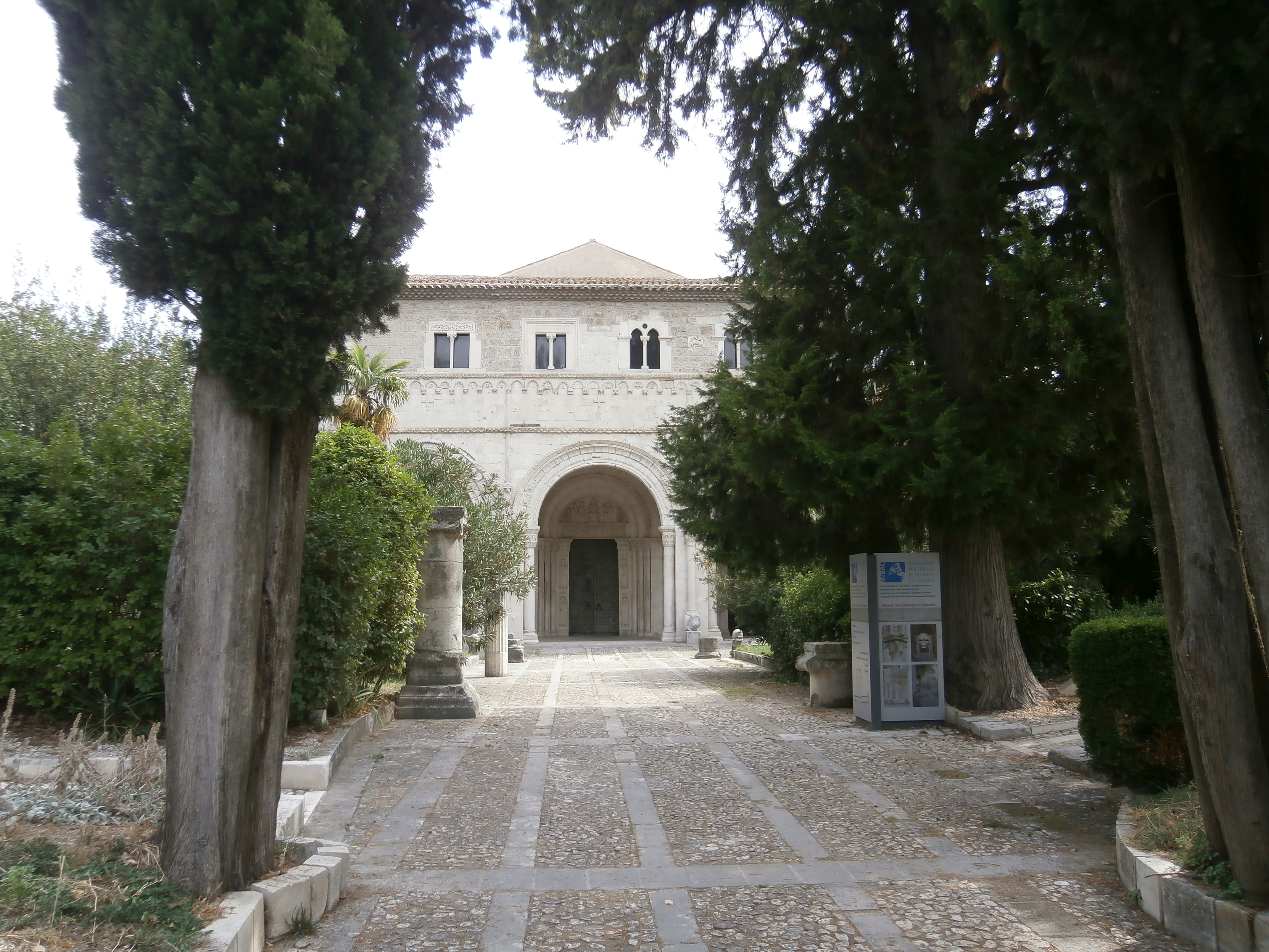 Abbazia di San Clemente a Casauria